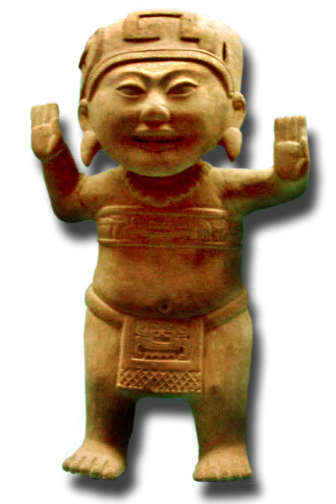 Remojadas figurine (Mexico)